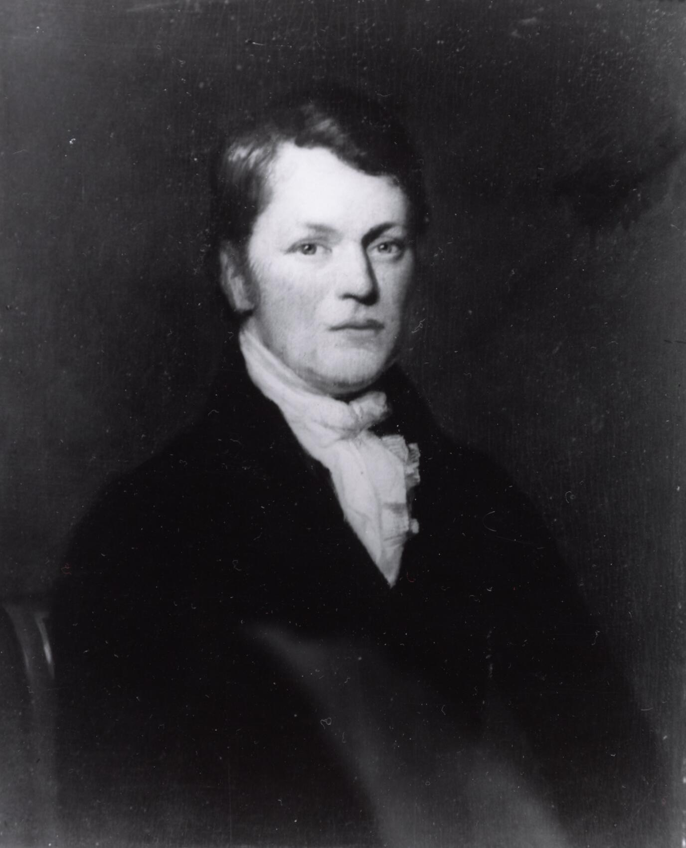 Johan de Sitter (1793-1855)